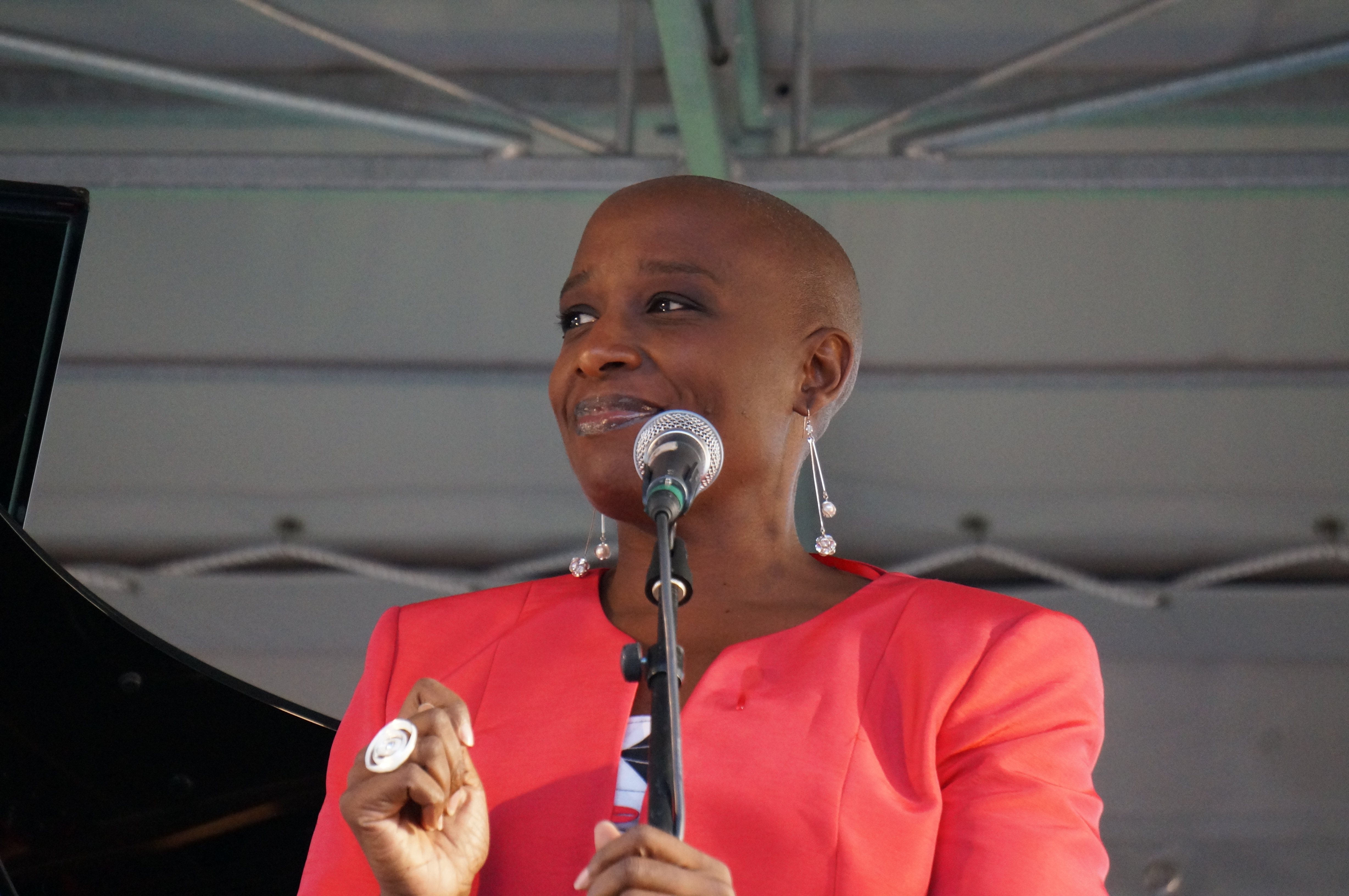 Lors des concerts entre vignes et forêts 2013 à Champillon.